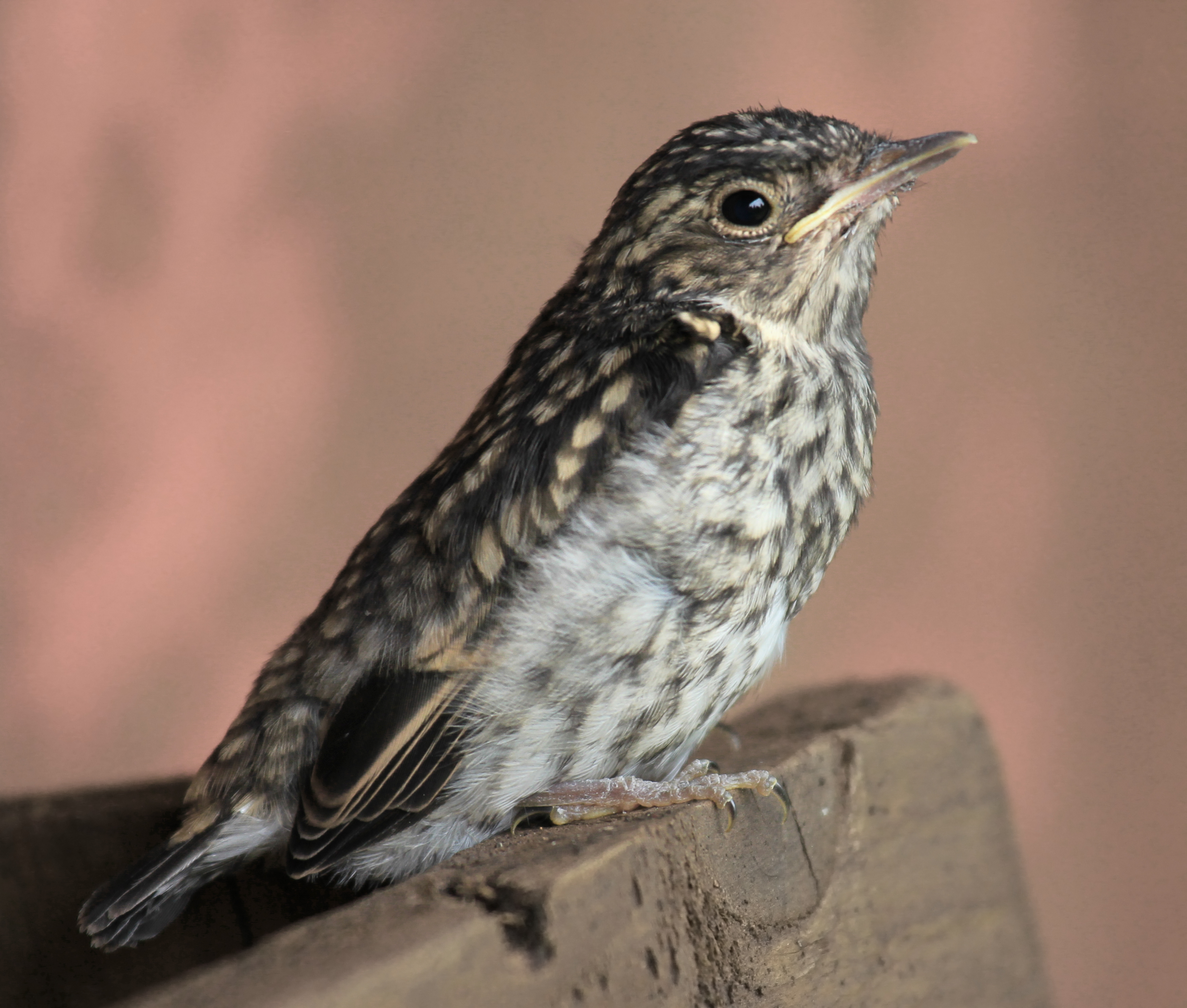 Põõsalind